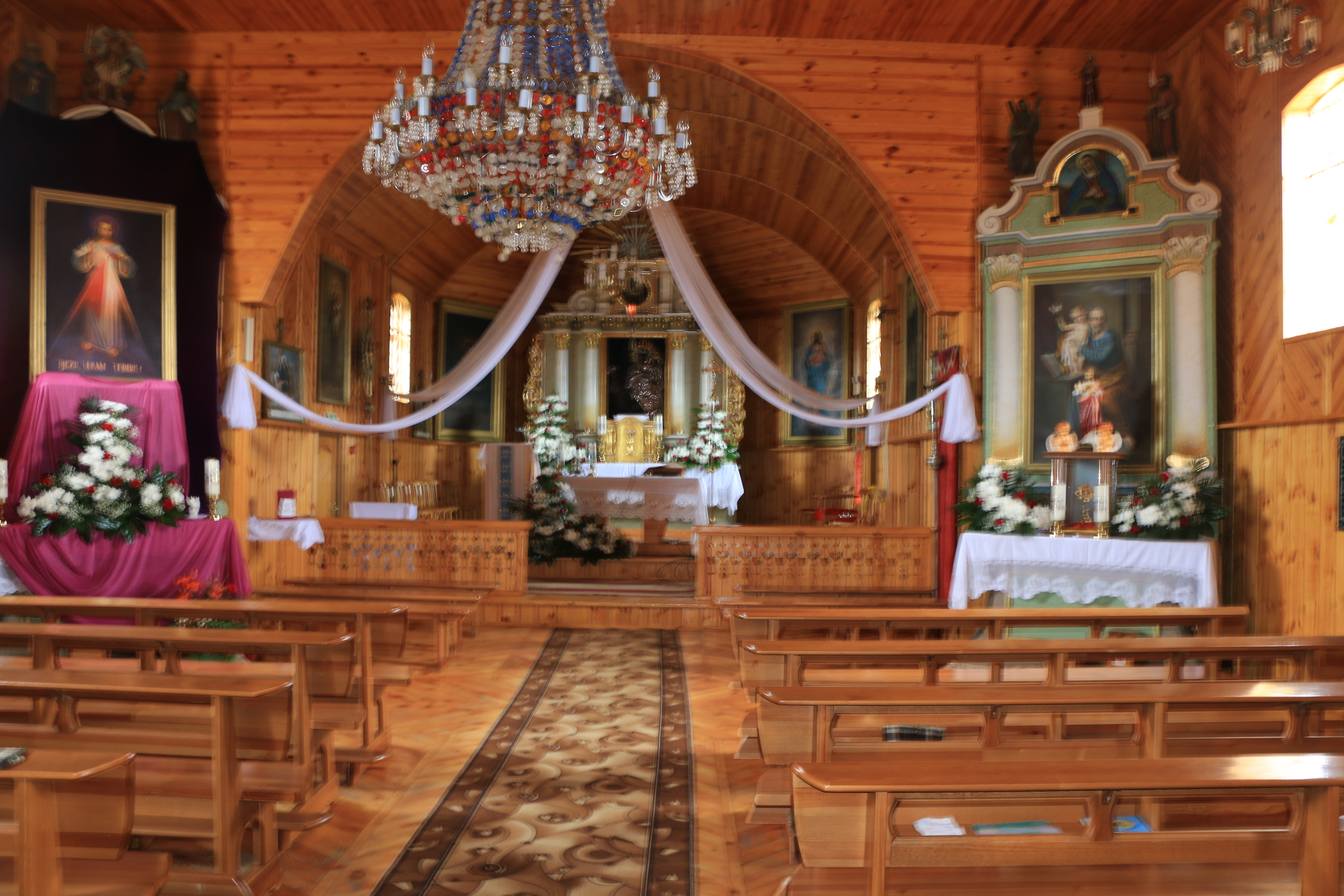 Trakieli, Belarus